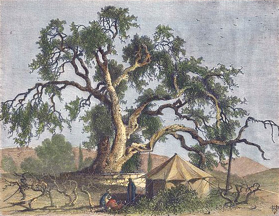 рисунок Авраамового дуба 1875 року